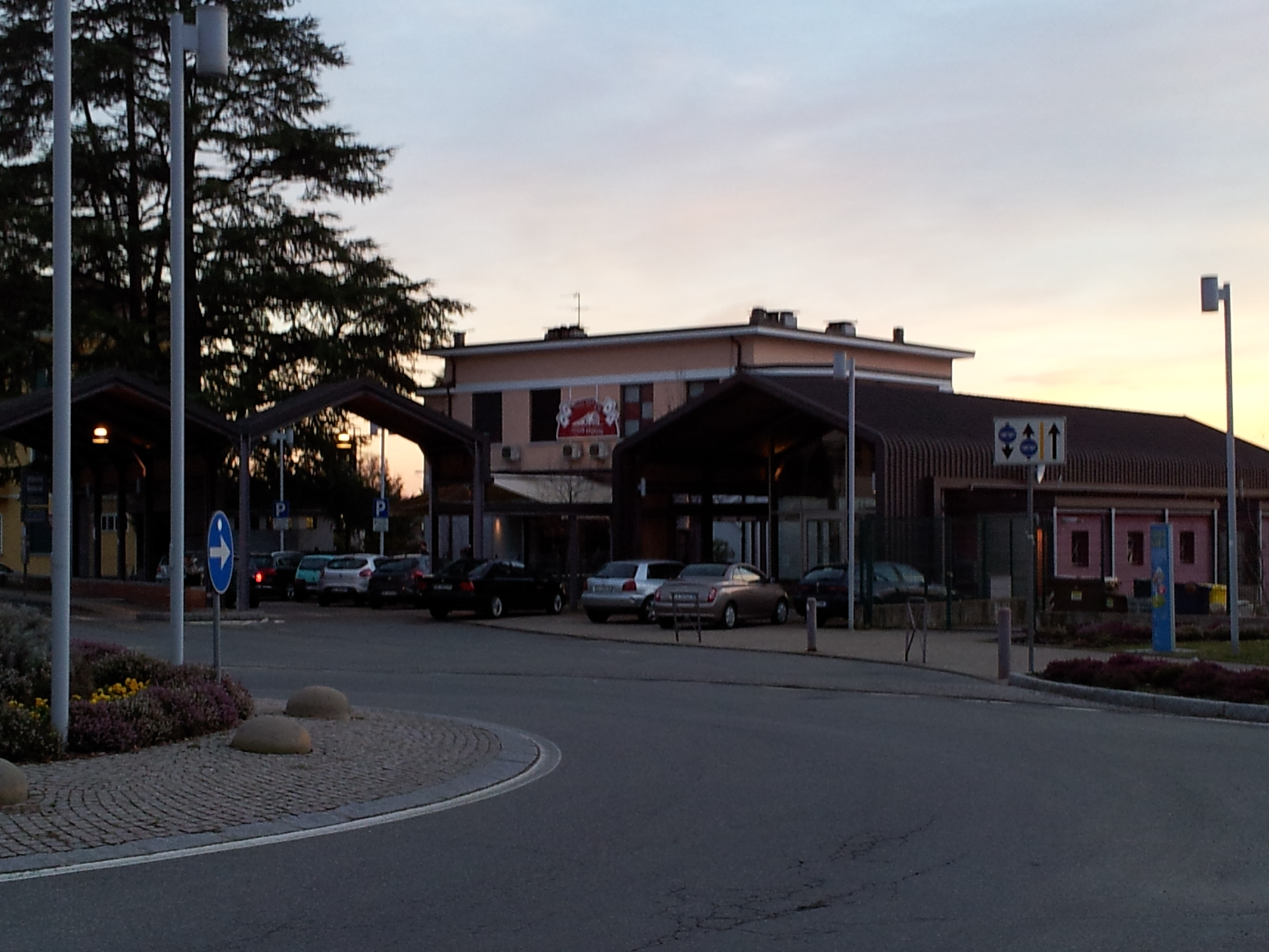 Stazione lato strada